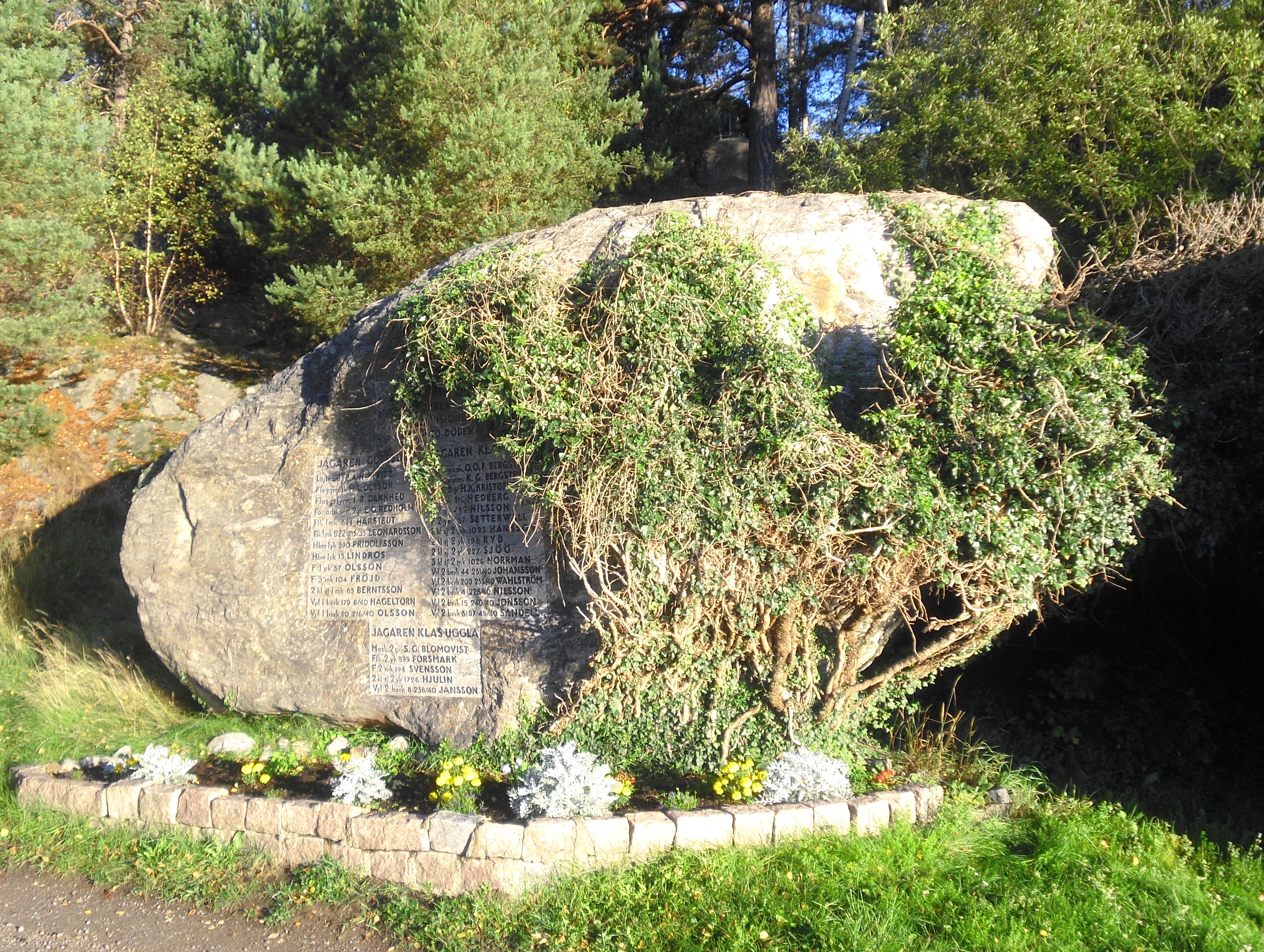 Minnessten på Märsgarn, Stockholms skärgård, med anledning av jagarolyckan på Horsfjärden 1941